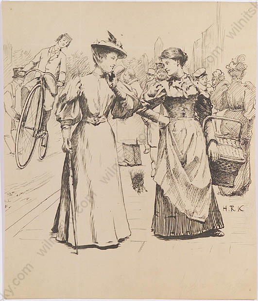 La Belle Epoque Scene